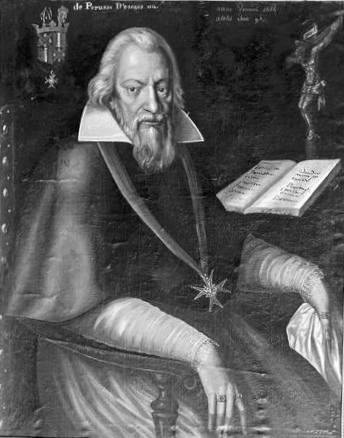 Portrait de Monseigneur Charles de Pérusse d'Escars (1522-1614), évêque de Poitiers